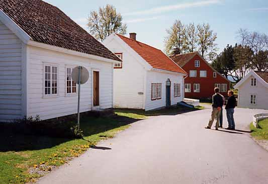 Norsk (nynorsk): Jelsa skulemuseum